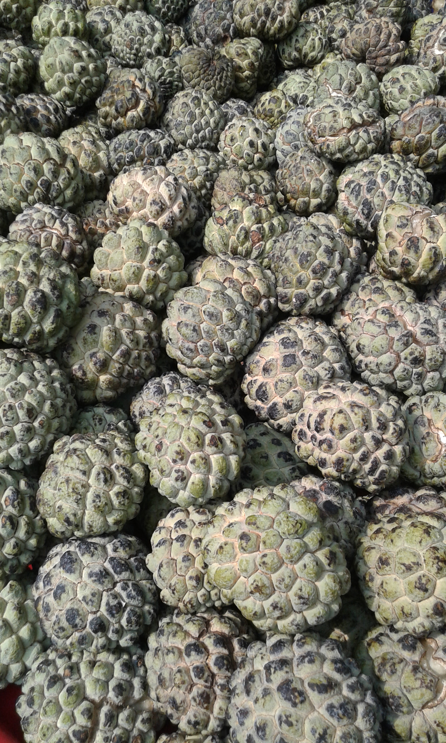 ഈനാമ്പഴം കേരള